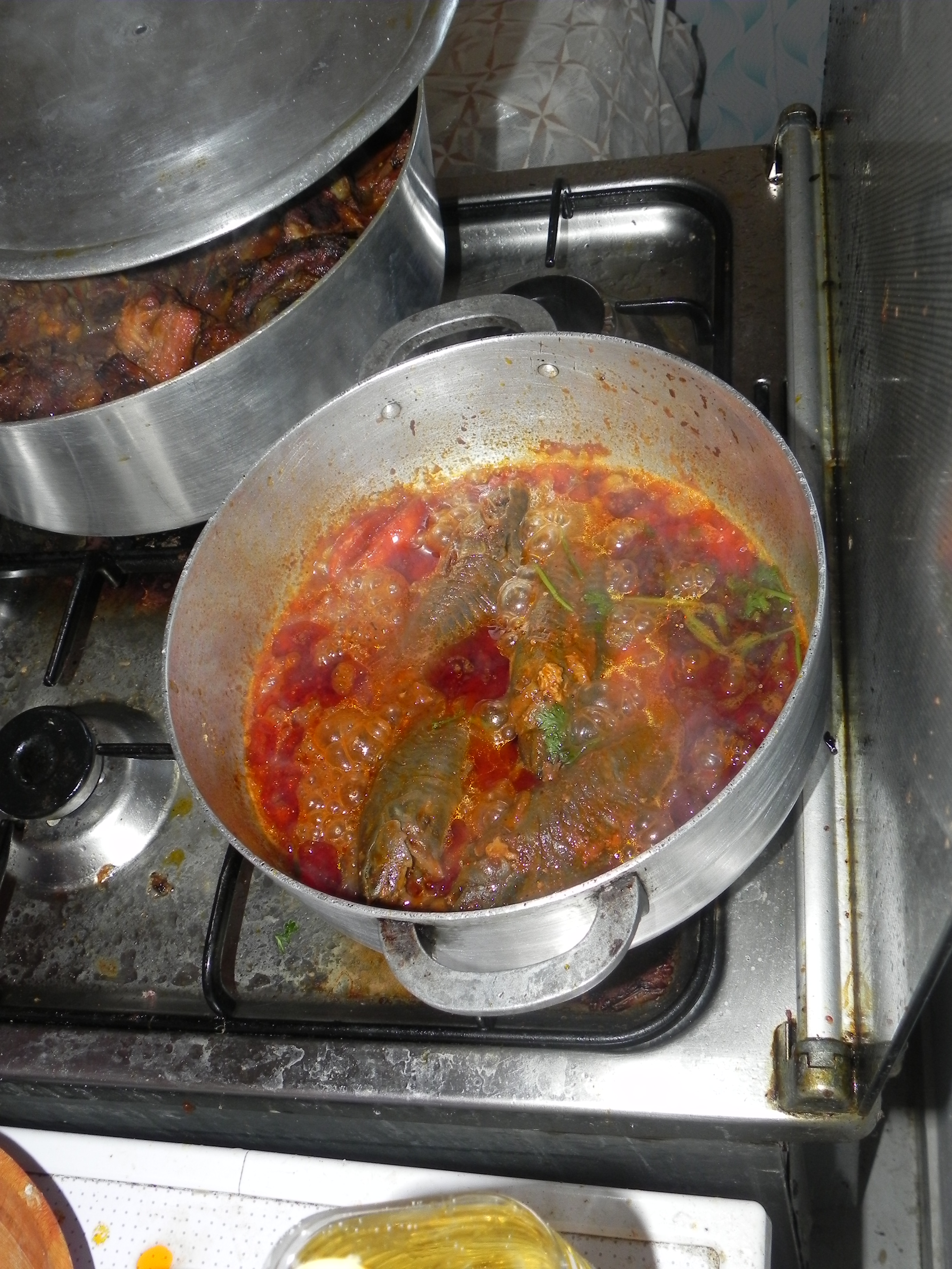 pimentade d'atipas (Hoplosternum littorale) en cours de cuisson